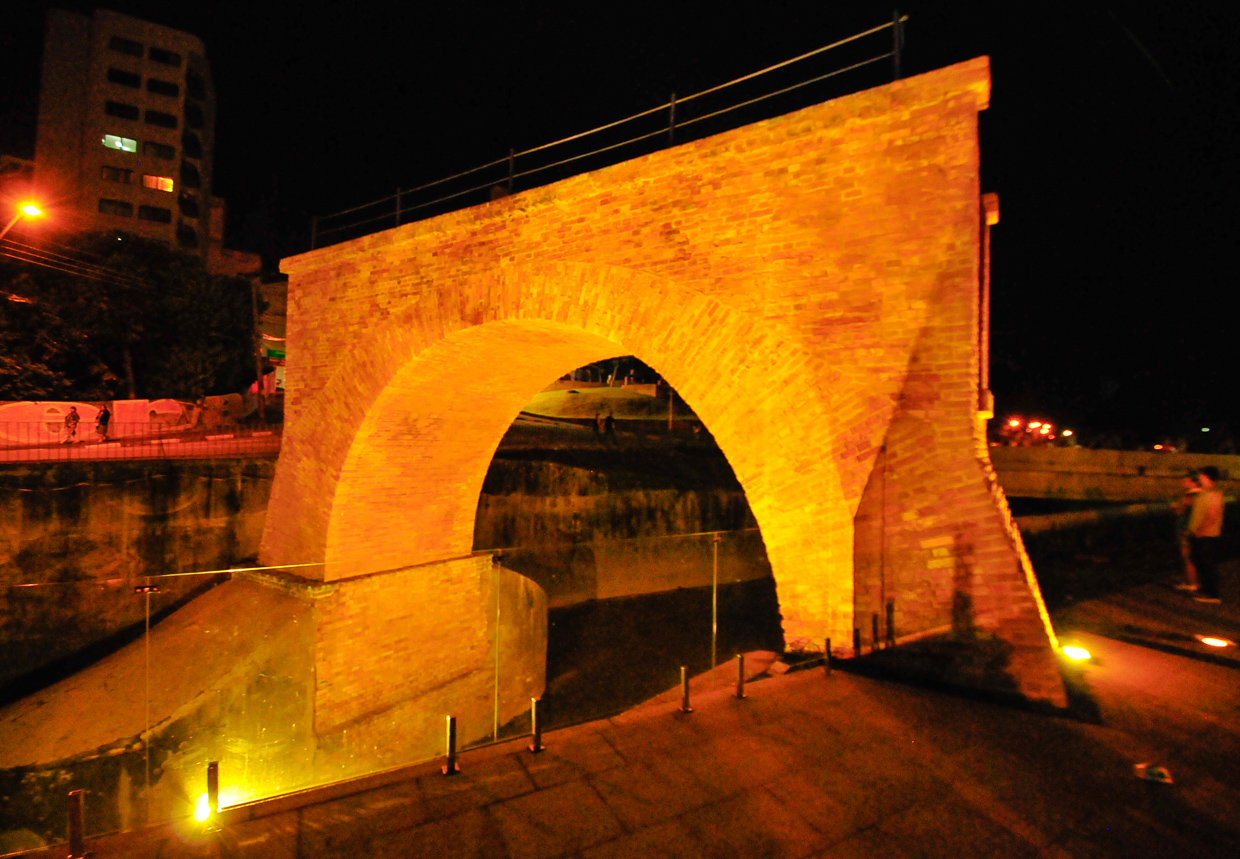 Símbolo histórico da cidade de Jundiaí, São Paulo.